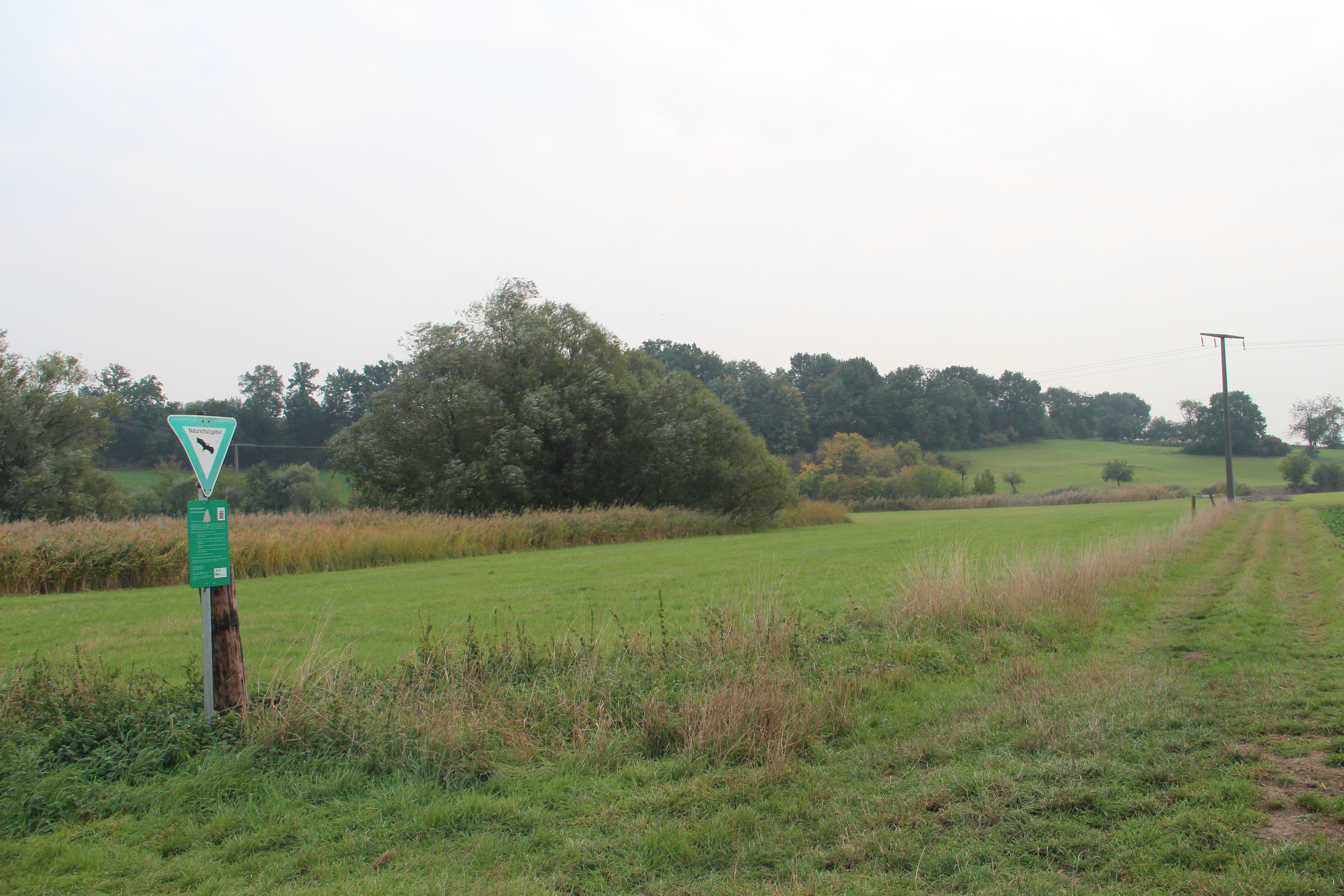 Naturschutzgebiet Hechtgraben bei Dorheim